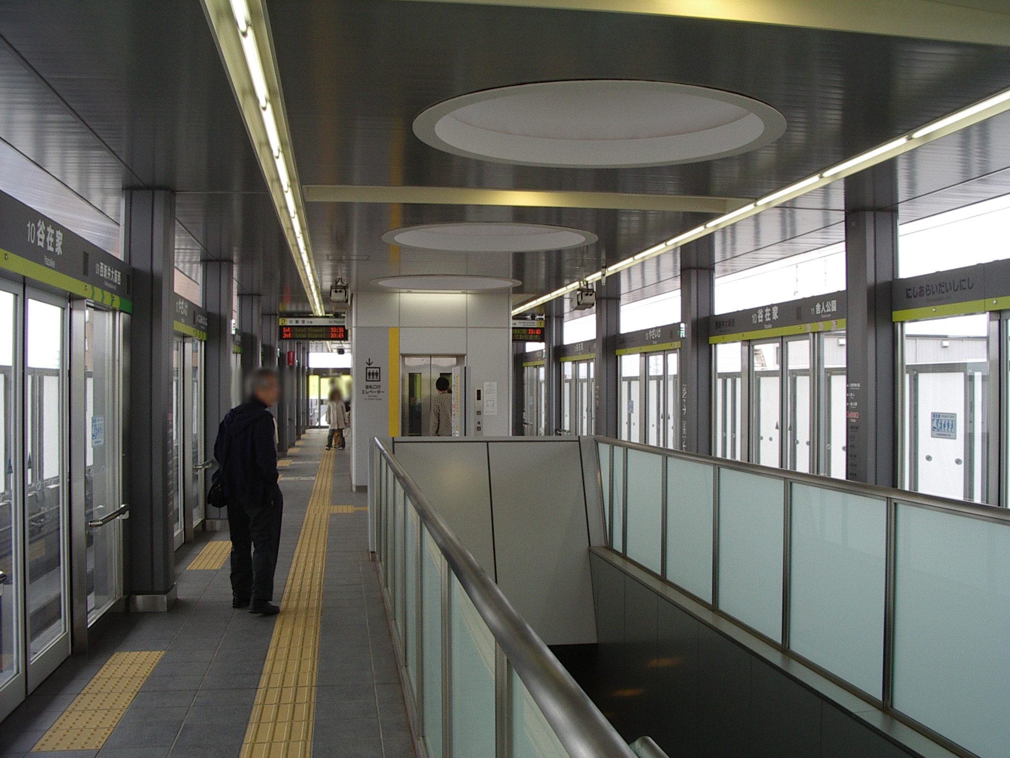 日暮里・舎人ライナー谷在家駅